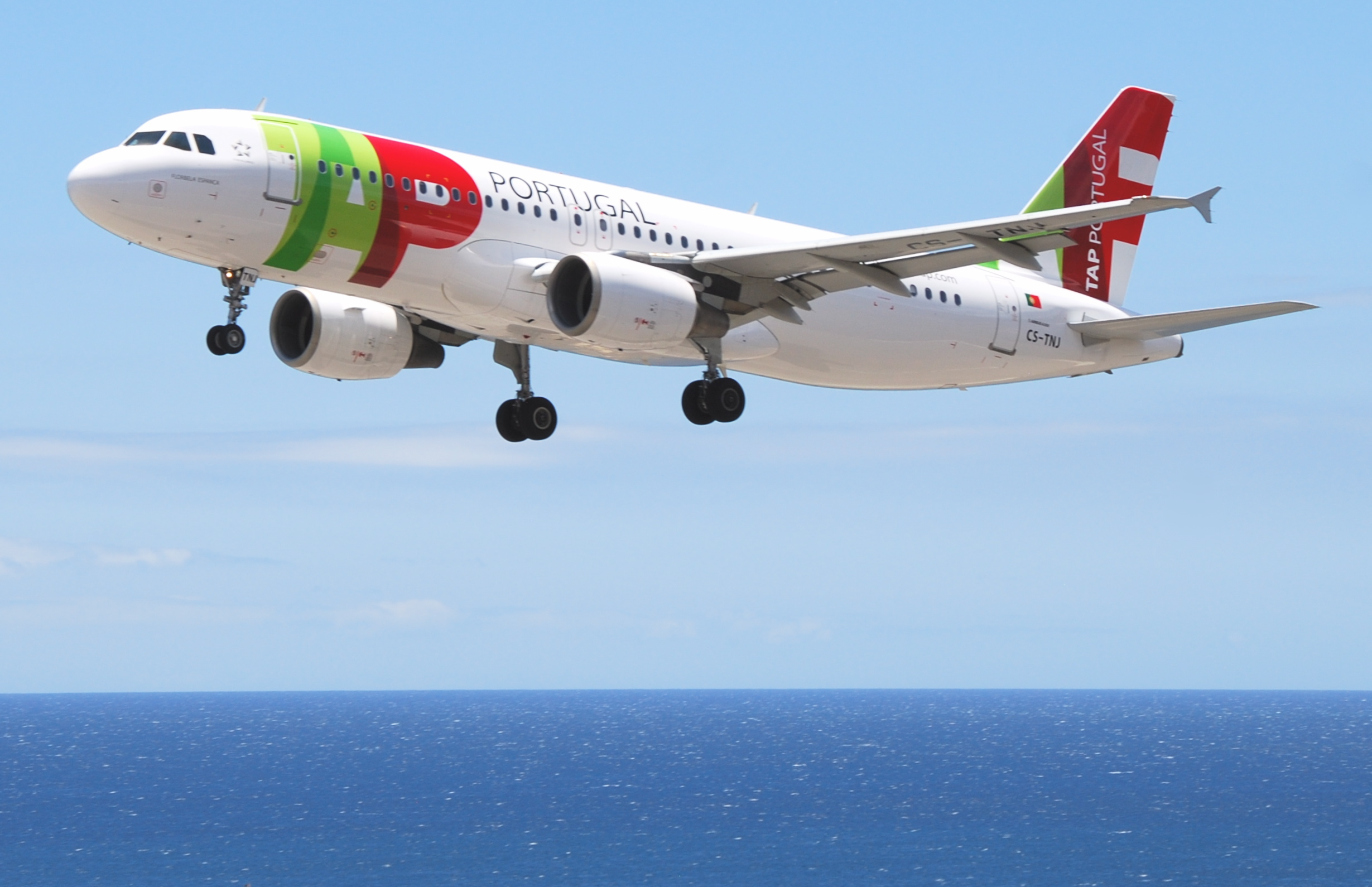 TAP Air Portugal Airbus A320-214; CS-TNJ@FNC;12.07.2011/607bc